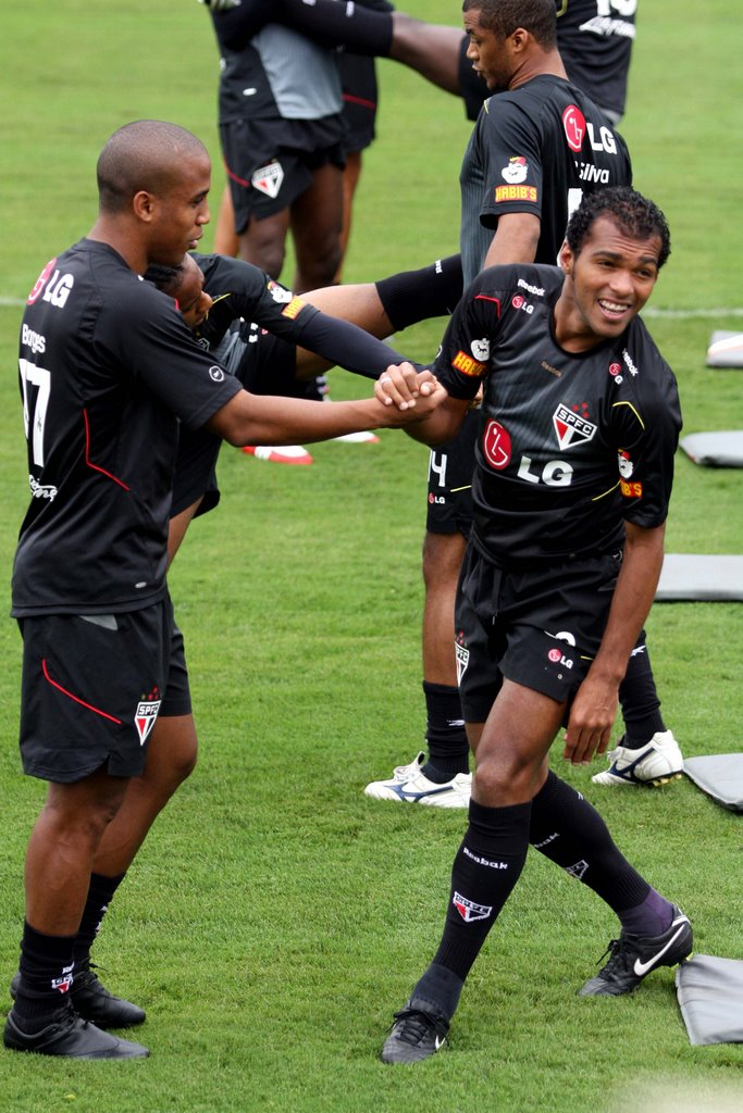 Os jogadores Borges e Richarlyson em 2009.